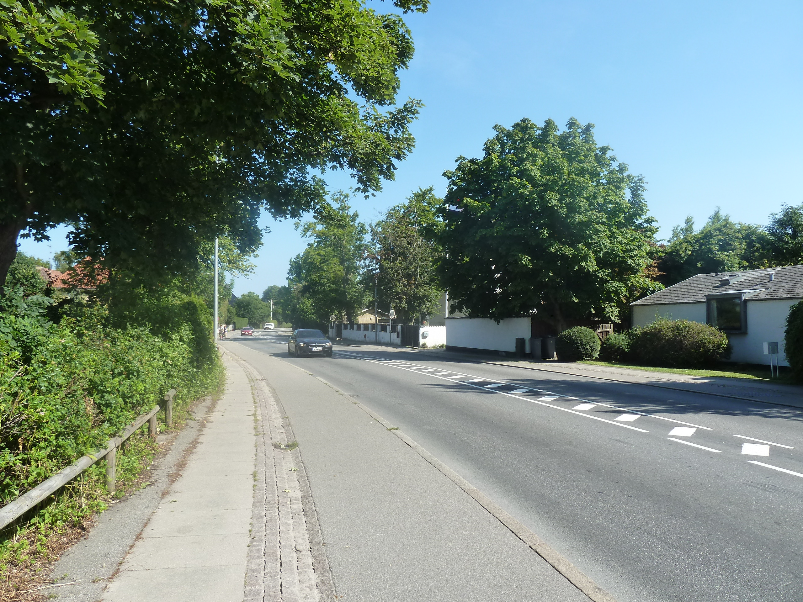 The street Strandøre in Østerbro in Copenhagen.